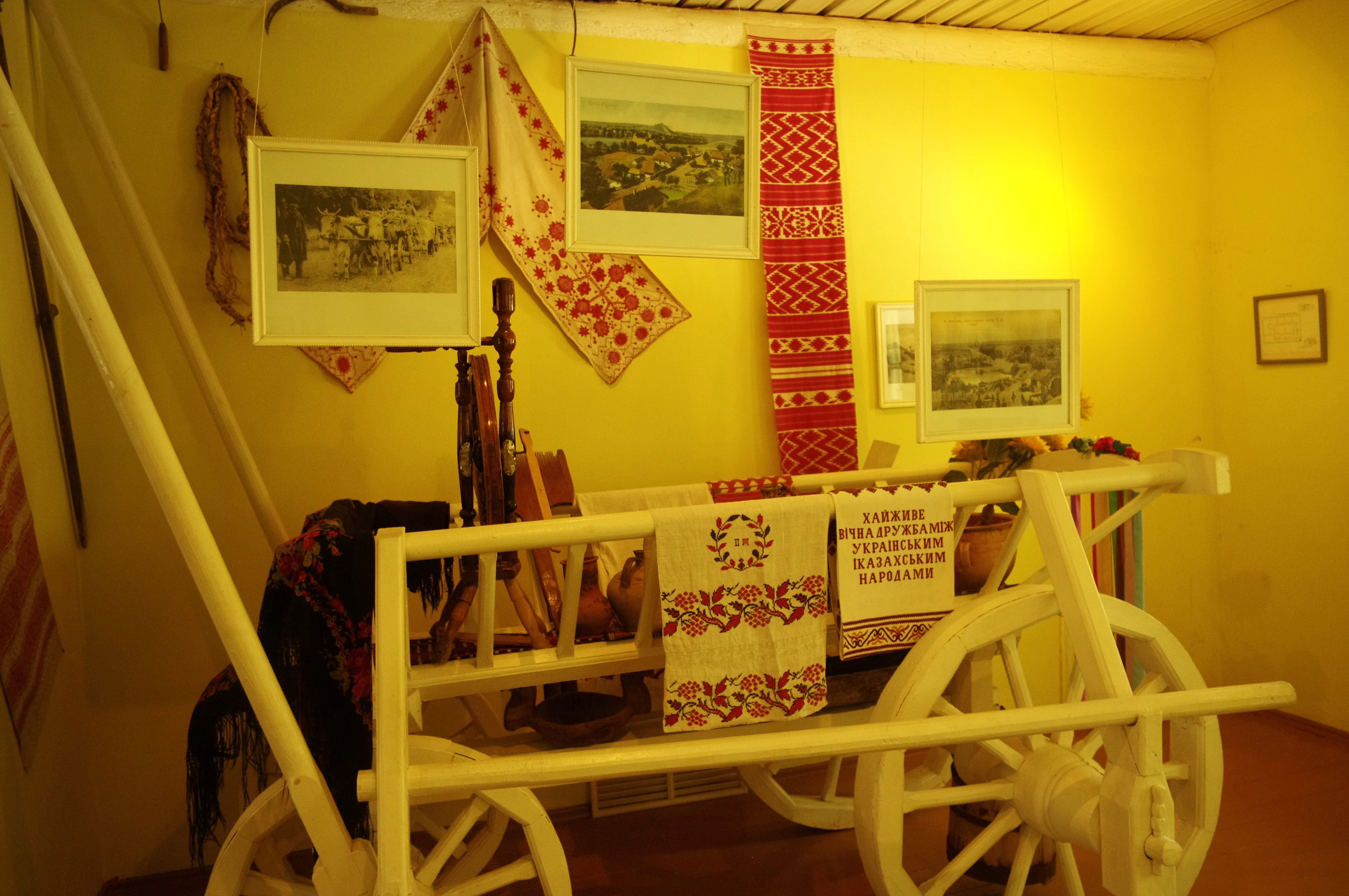 The making of this document was supported by Wikimedia Polska. To zdjęcie zostało wykonane podczas Wikiwyprawy 2015. Wszystkie zdjęcia z wyprawy możesz zobaczyć w kategorii: Wikiwyprawa 2015. English | polski | +/− To zdjęcie zostało załadowane dzięki współpracy z firmą Hyperbook. polski | +/− To zdjęcie zostało załadowane dzięki współpracy z firmą: Kopex Group. English | polski | +/−